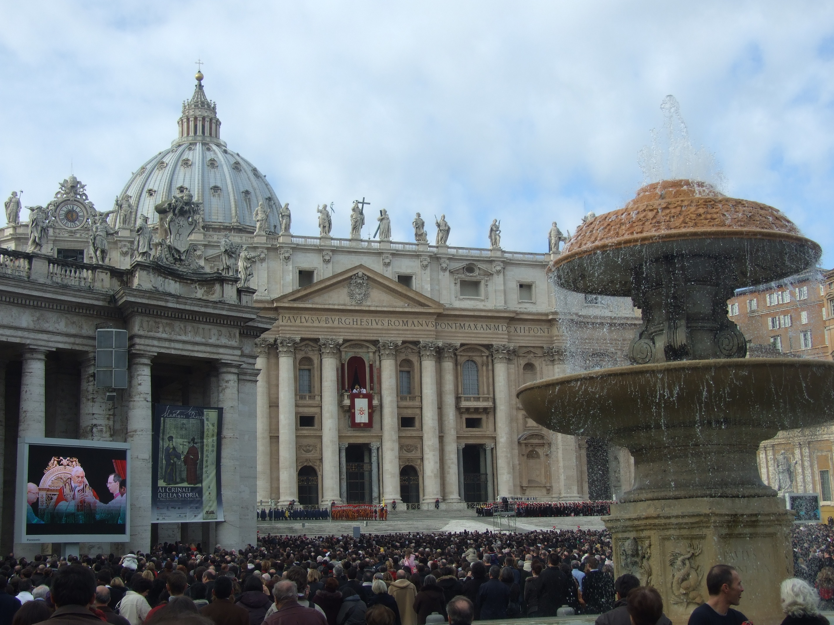 En la plaza San Pedro del Vaticano en Navidad mientras habla el Papa Benedicto.